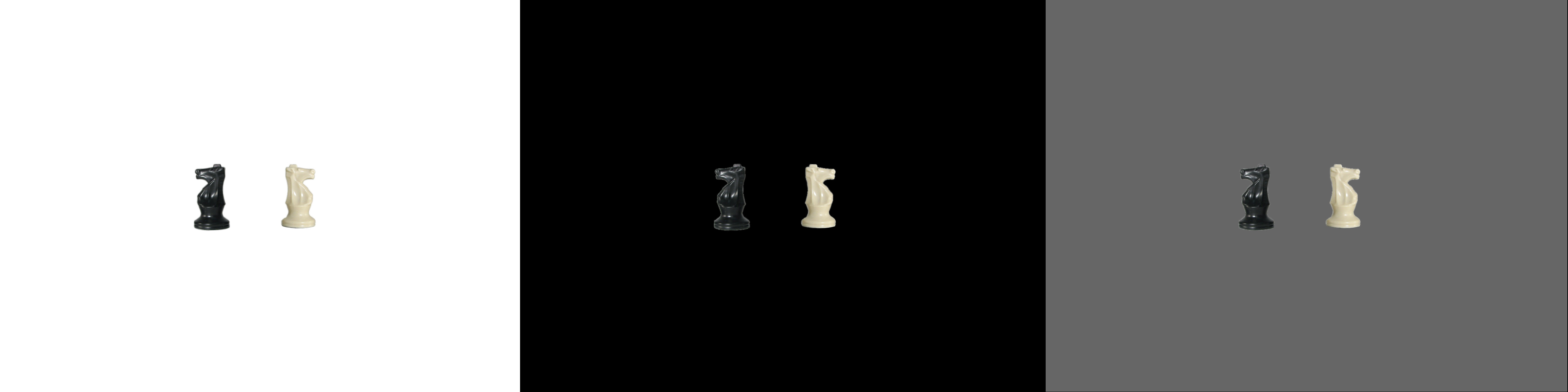 CABALLOS DE AJEDREZ